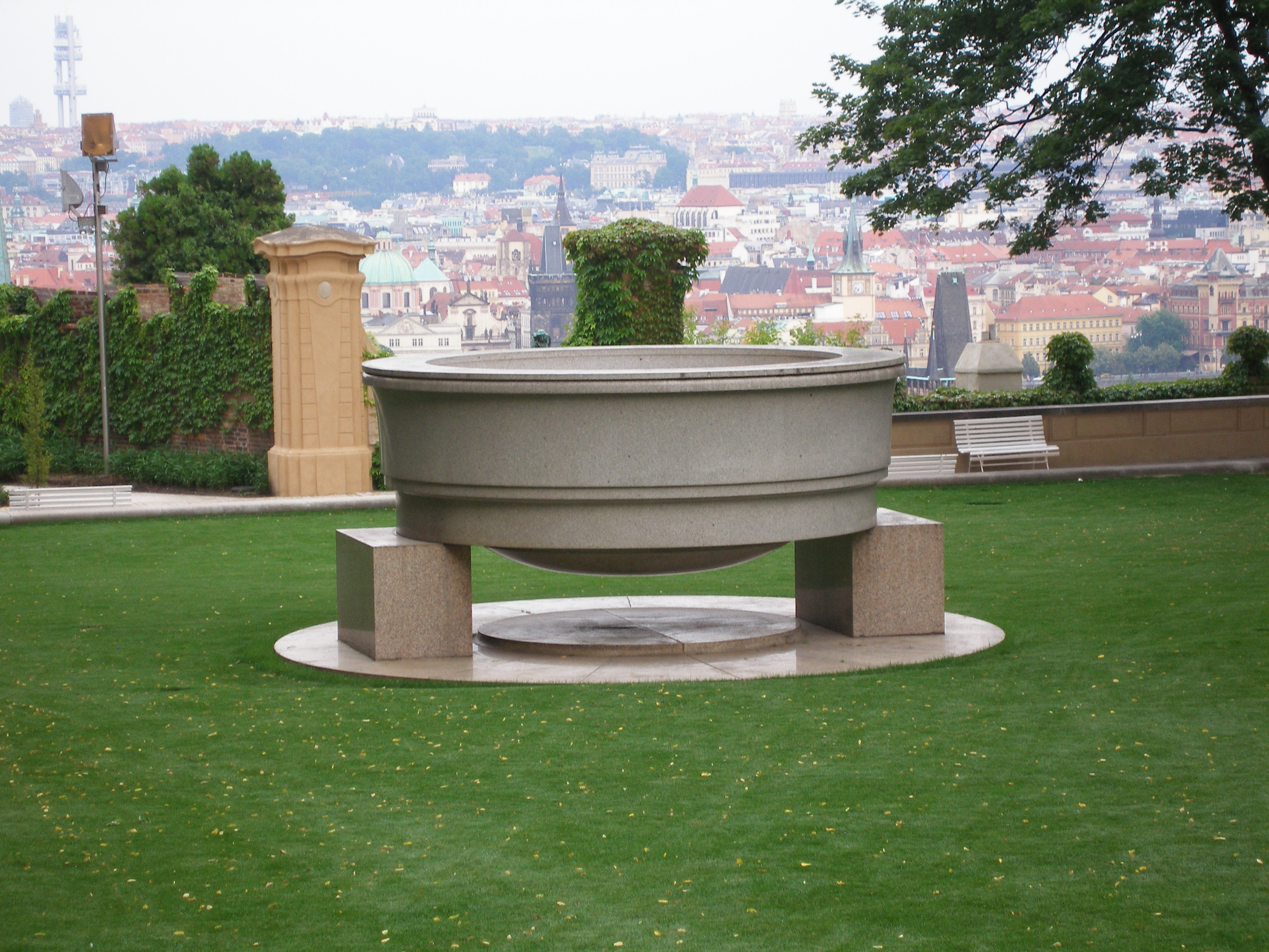 Kamenná mísa v Rajské zahradě Pražského hradu opracovaná z mrákotínské žuly.